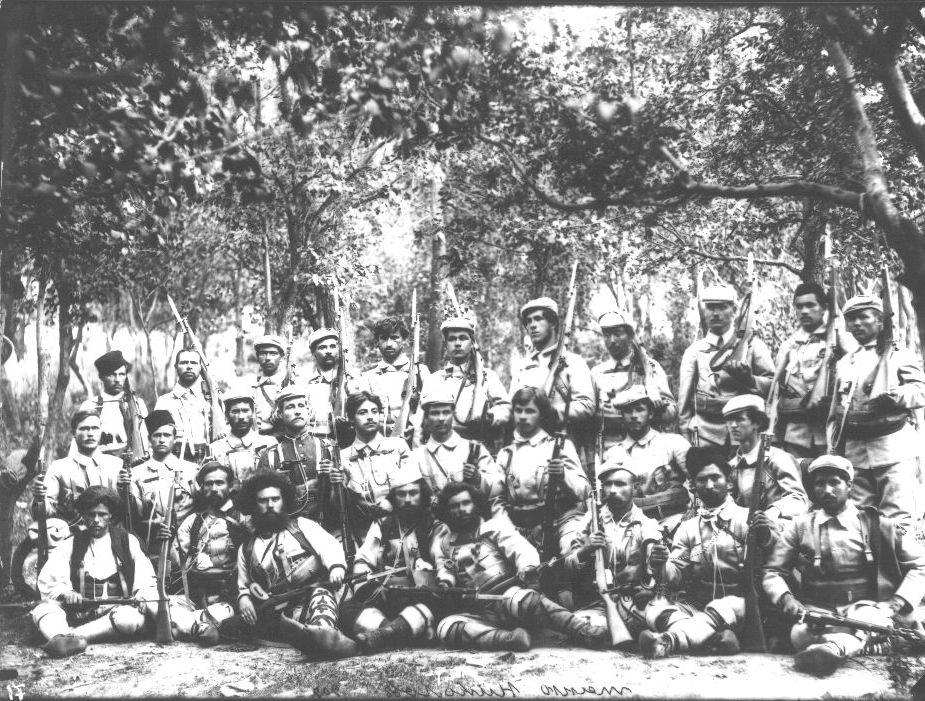 Четата на Тане Николов, участвала на Ножот.